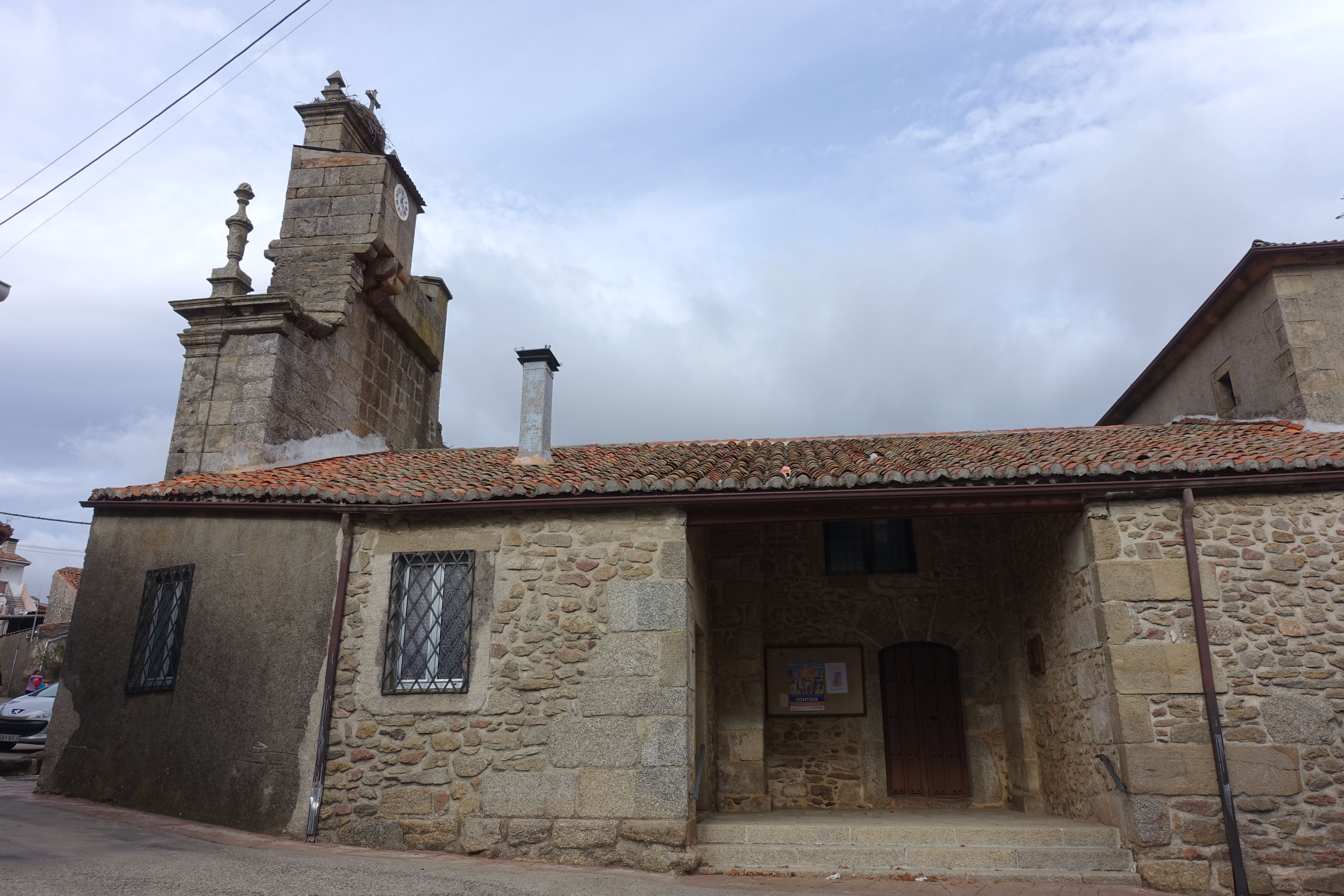 Iglesia de San Juan Evangelista, Navasfrías (Salamanca, España).